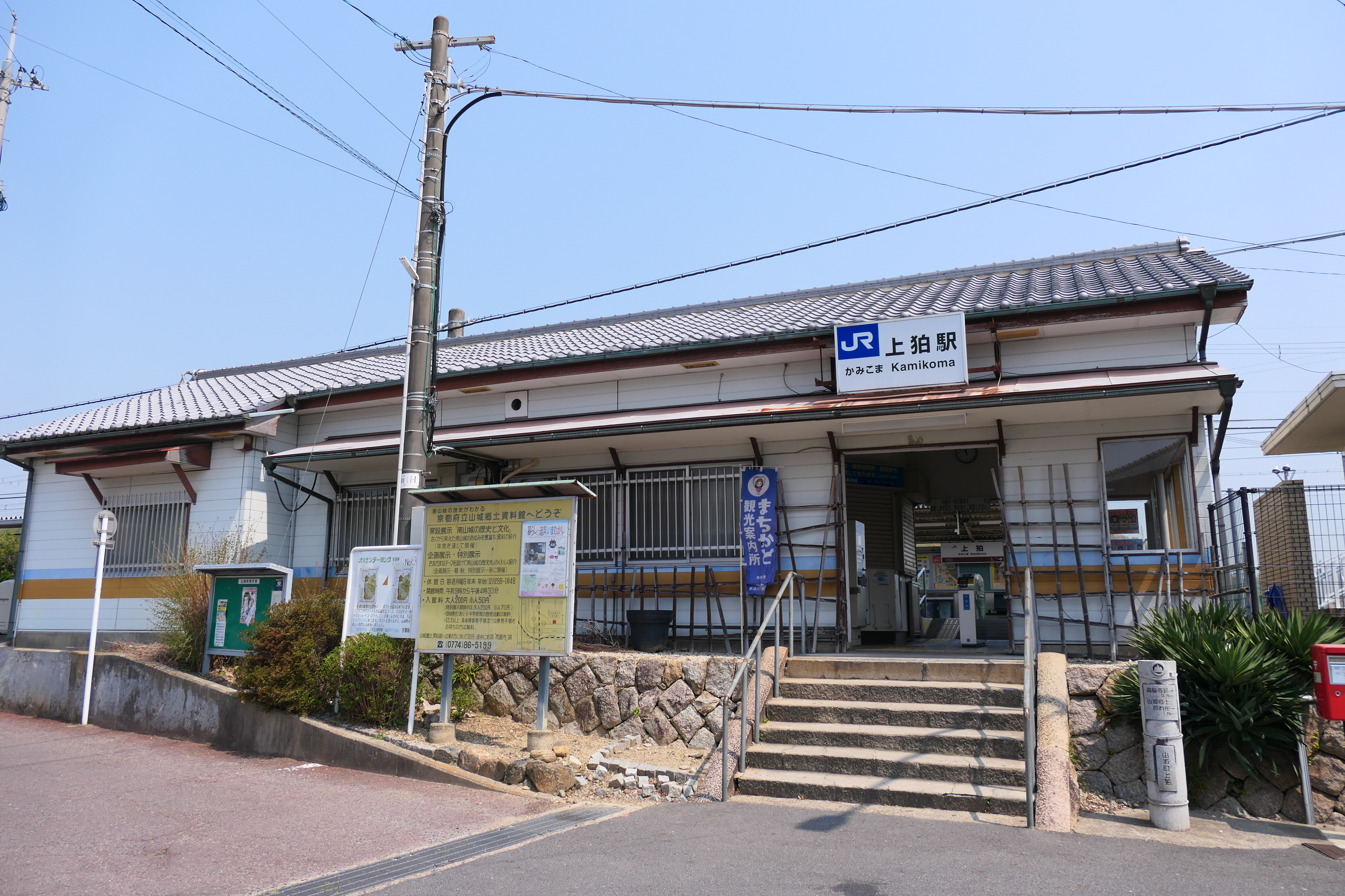 上狛駅舎の外観